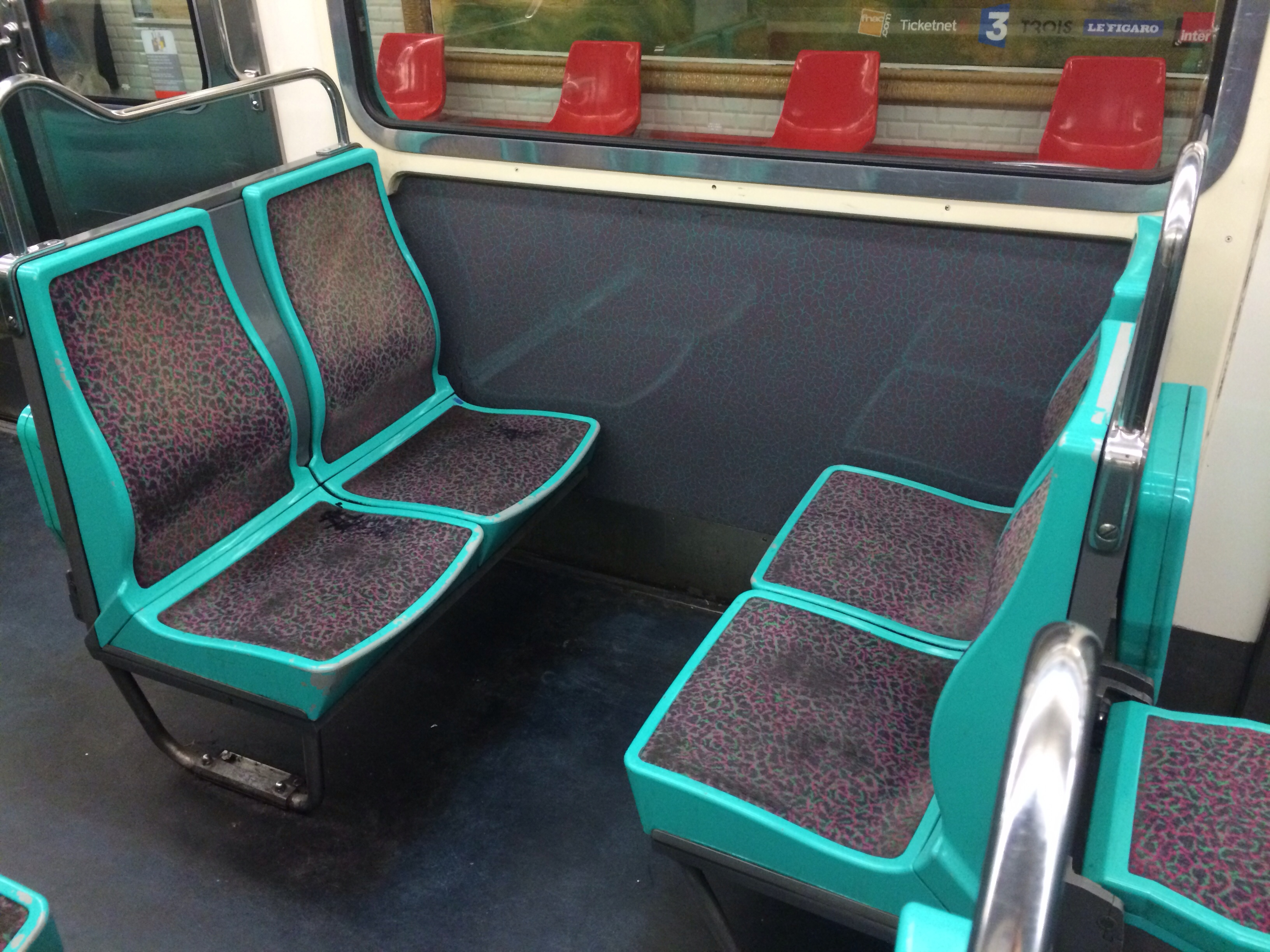 Sièges MF67